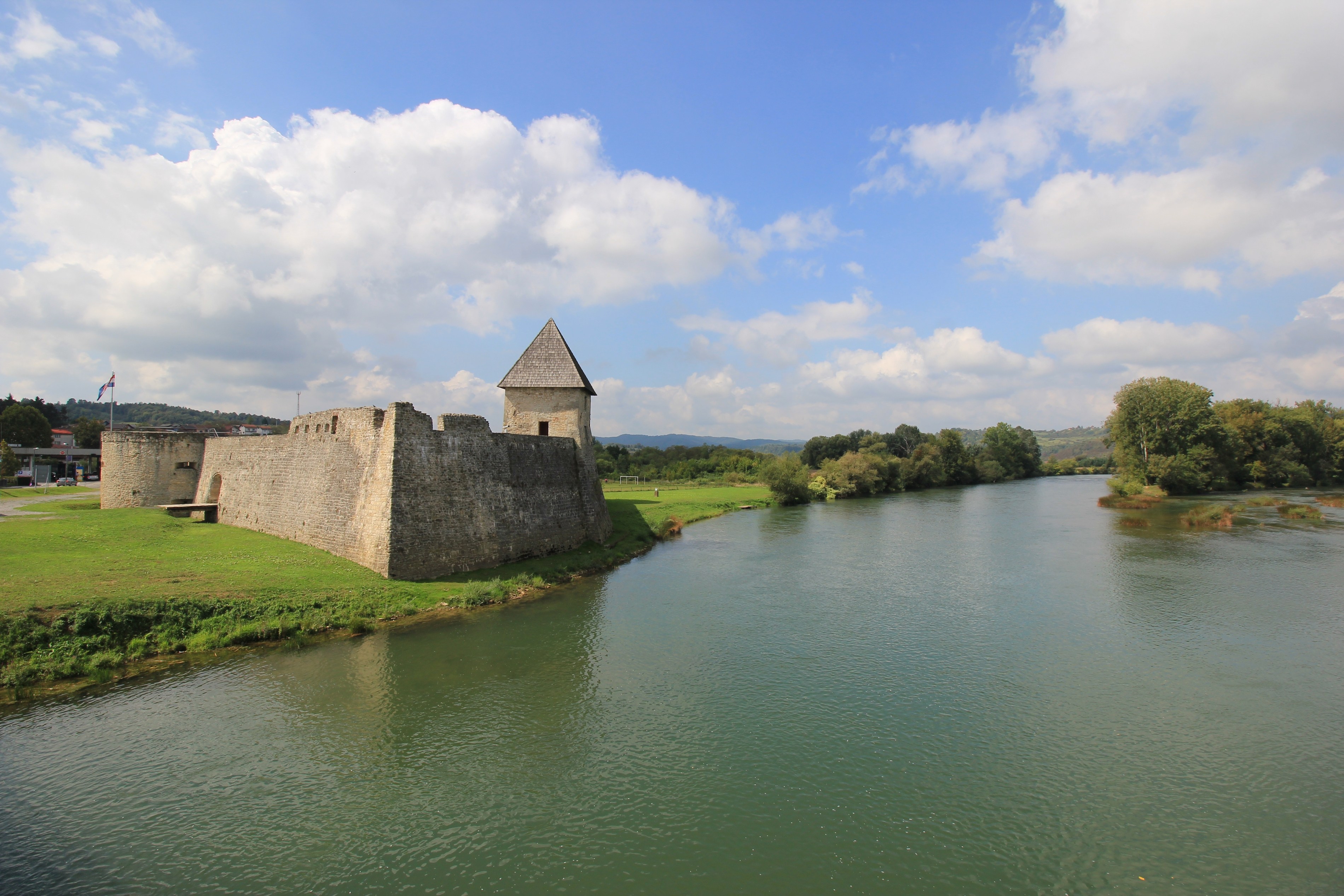 Festung an der Una in Hrvatska Kostajnica, Kroatien.